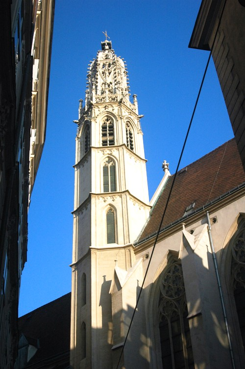 Maria am Gestade